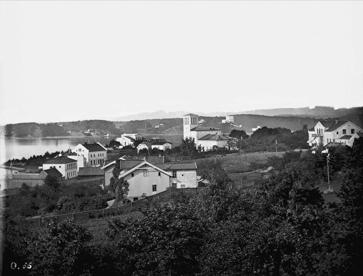 Hjortnes og Framnes, med utsikt mot Bygdøy og Oscarshall, ca. 1869